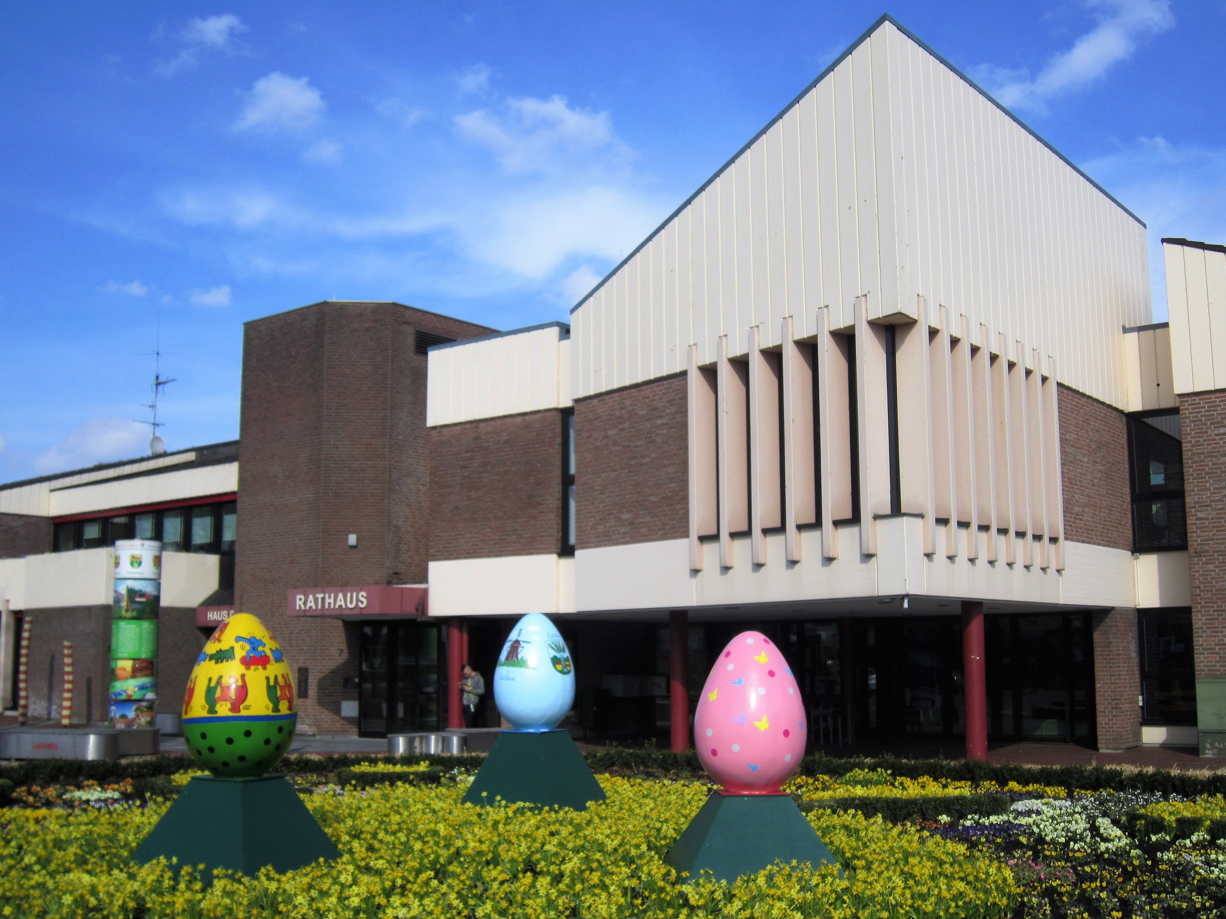 Osternest vor dem Lathener Rathaus